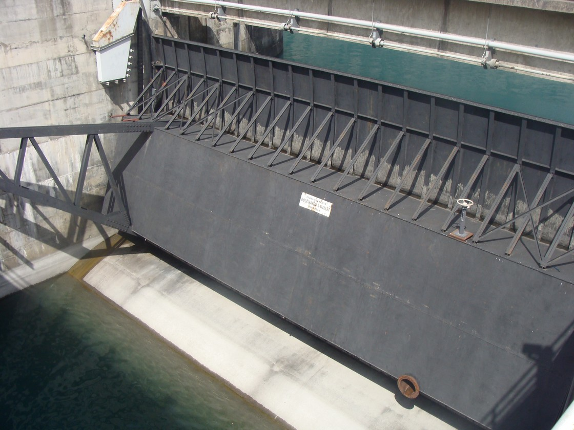 Une vanne de contrôle du débit d'entrée du canal EDF de la Durance à la sortie du bassin de compensation du barrage de Serre-Ponçon.